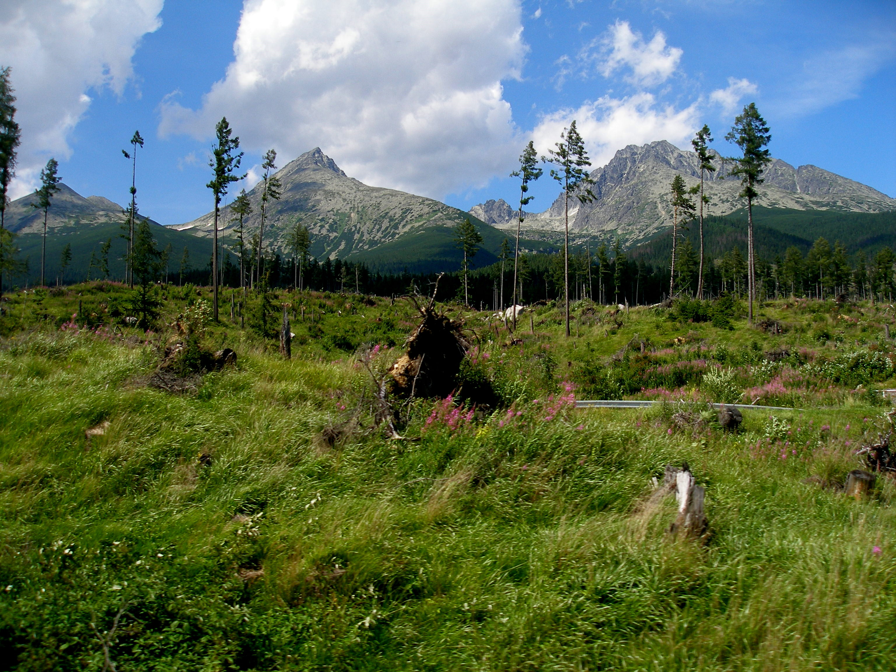 Tatranská osada Tatranské Zruby, mesto Vysoké Tatry, okres Poprad